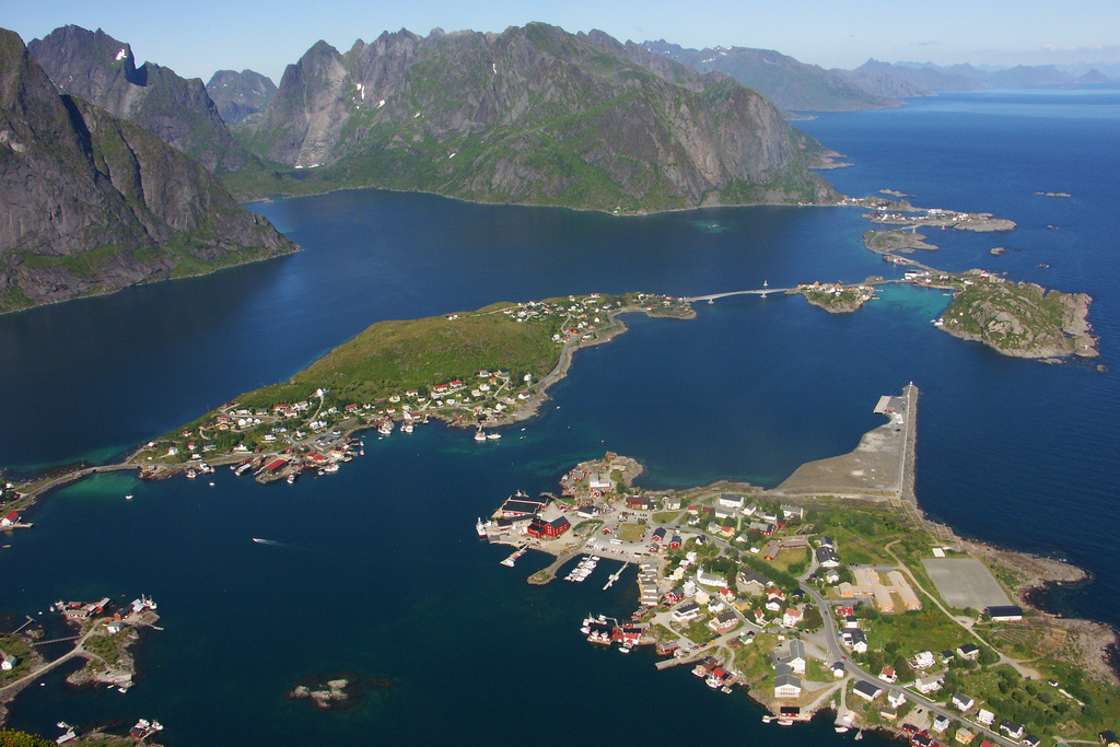 Reine sett frå Reinebringen